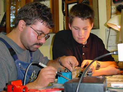 Ausbildung durch den Leiter der AG - Fernmeldetechnik (F-AG) Michael Schmidt (siehe Berliner Parkeisenbahn)